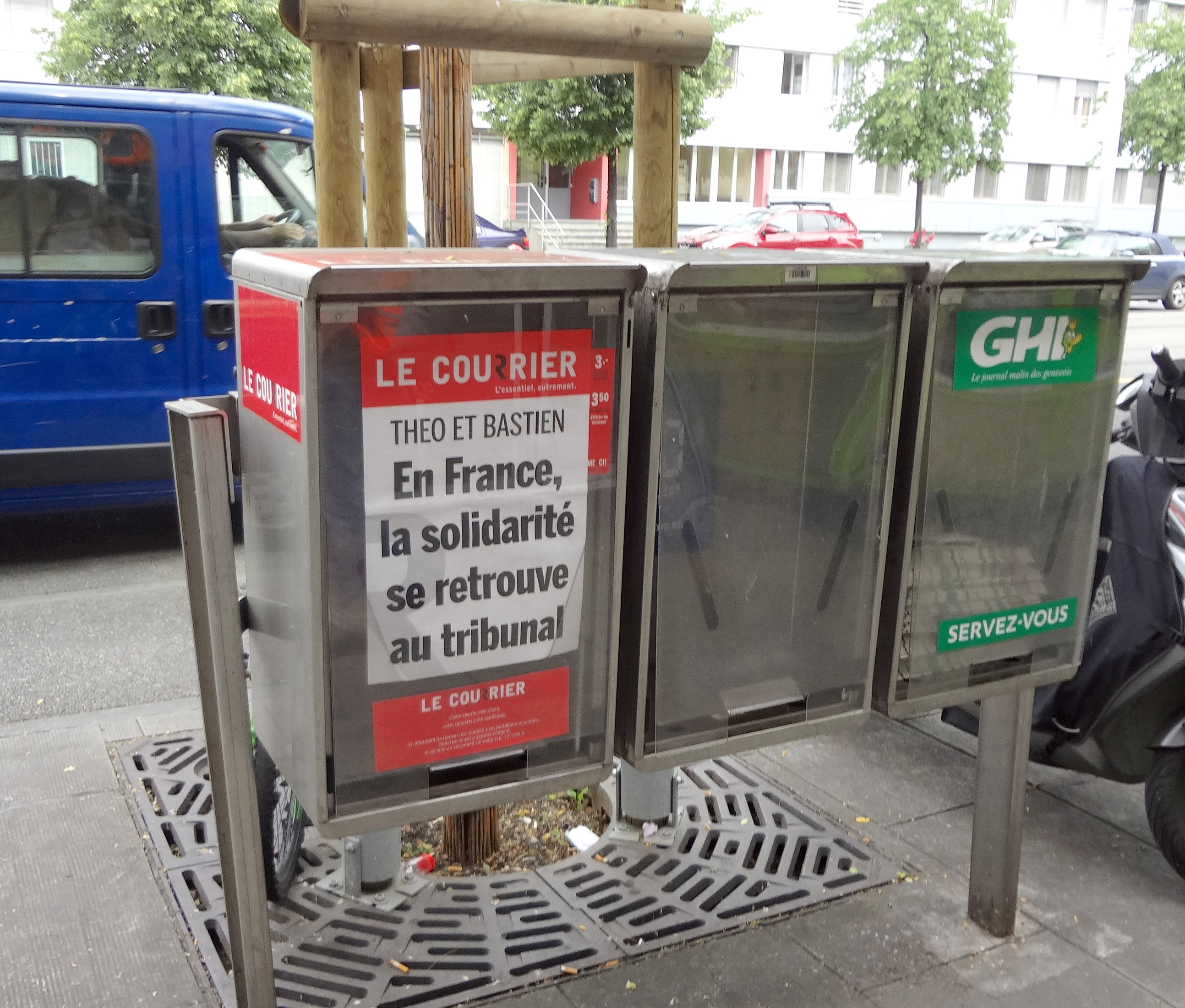 Groupe de trois cassettes pour la vente de journaux, à la route des Acacias, Genève, Le Courrier (payant), 20 Minutes (gratuit) et Genève Home Informations (GHI) (gratuit). Manchette du Courrier de Genève : « Théo et Bastien : En France, la solidarité se retrouve au tribunal » (arrêtés à Briançon après une manifestation de soutien aux migrants) [1].